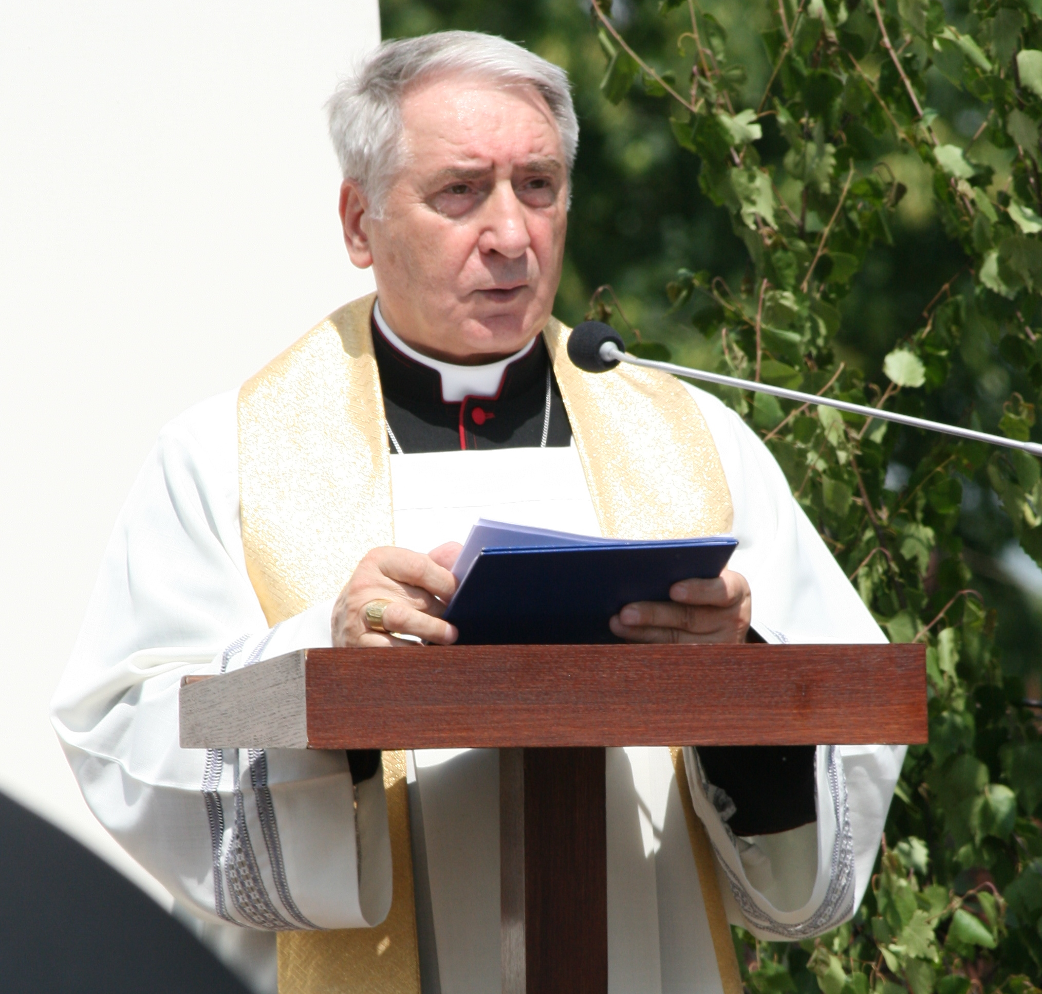 Nuncjusz apostolski w Polsce abp Józef Kowalczyk podczas uroczystości Bożego Ciała w Płocku, 11 czerwca 2009.